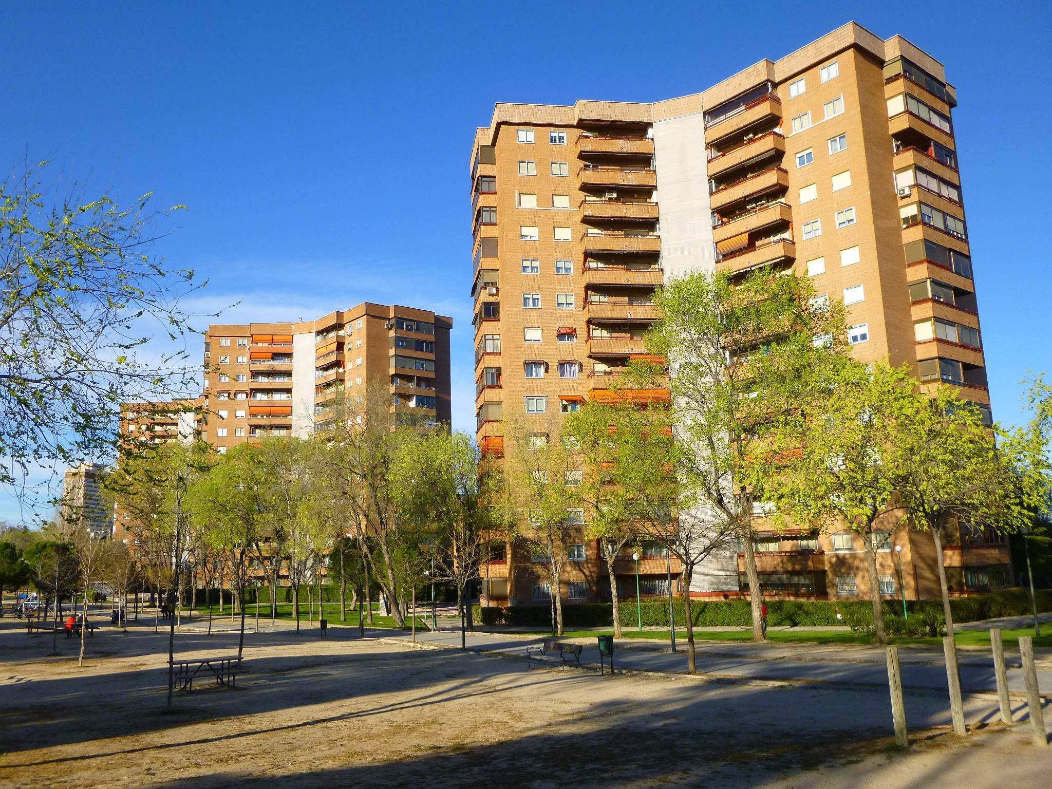 Barrio de Vista Alegre, distrito de Carabanchel, Madrid